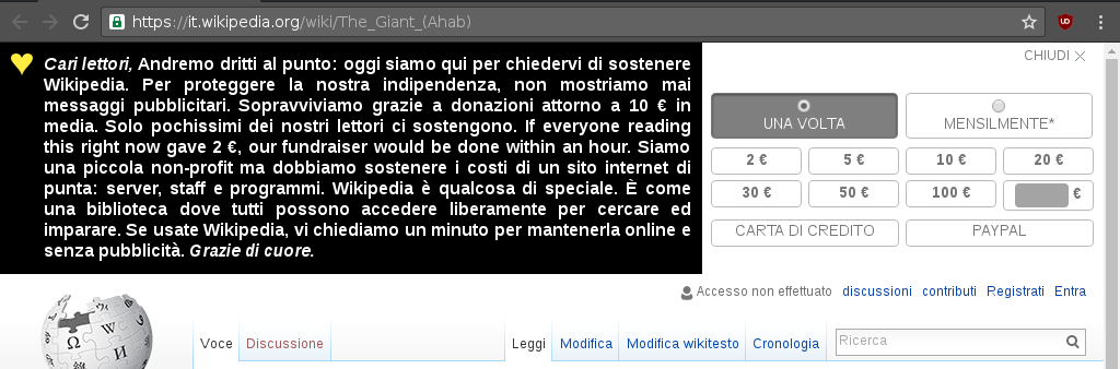 Fundraising banner on the Italian Wikipedia